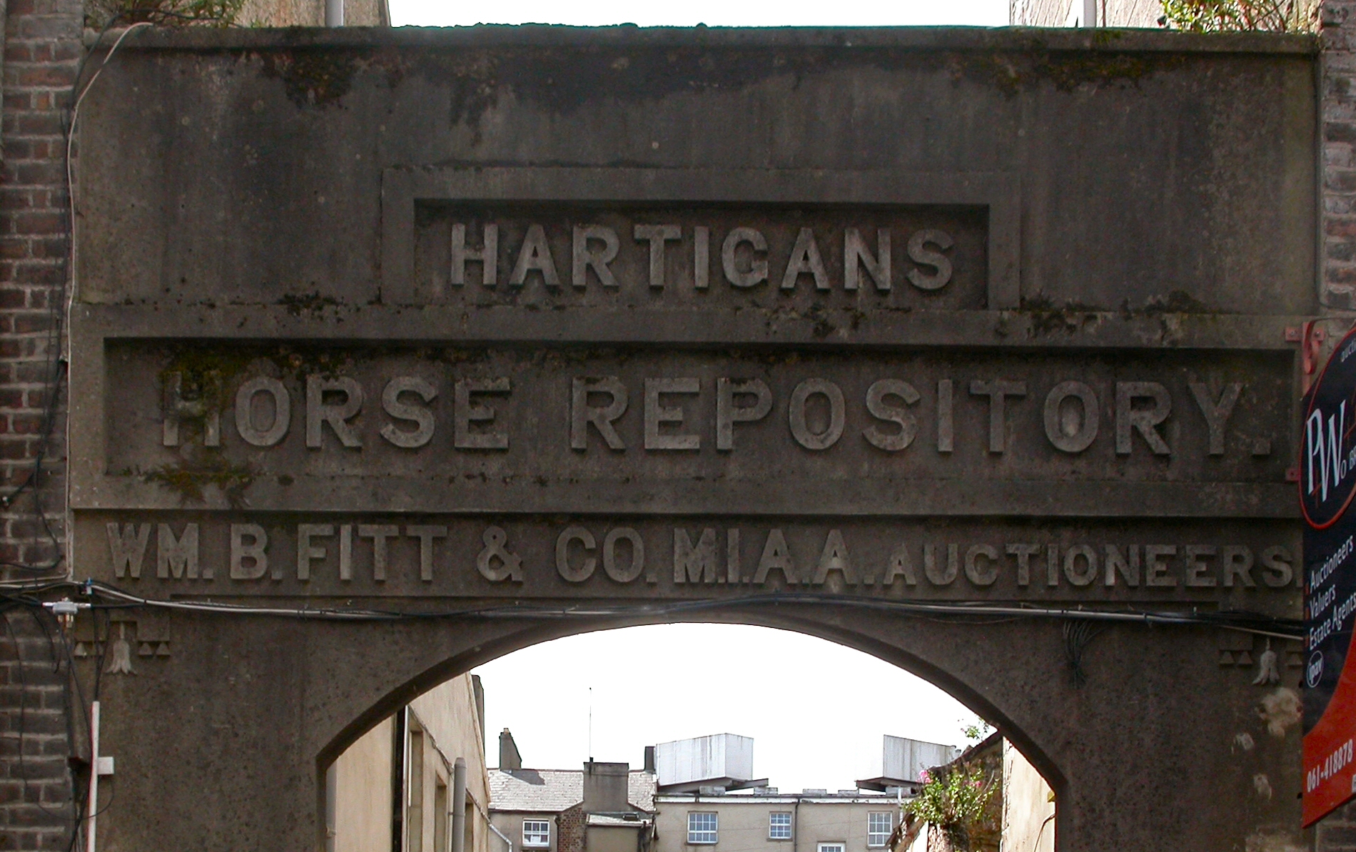 Stua sean-stabla, Luimneach